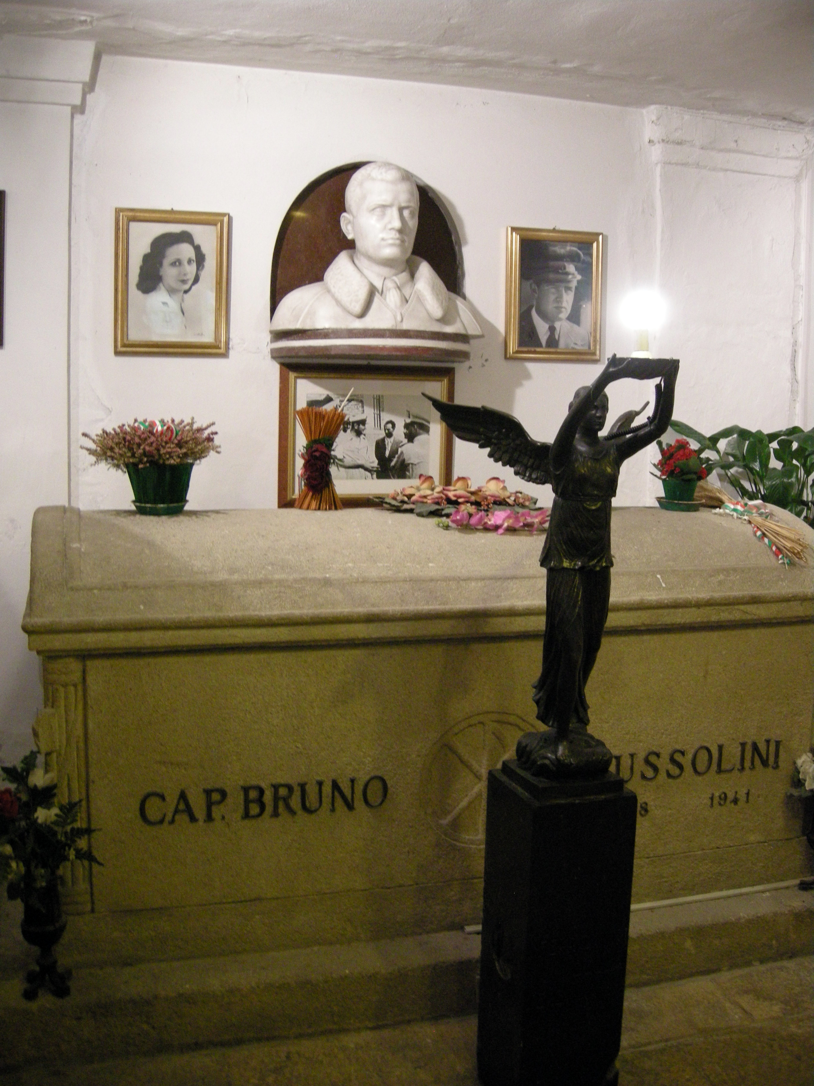 Cripta del cimitero di San Cassiano a Predappio, tombe della famiglia Mussolini